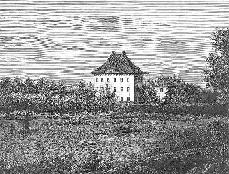 Villnäs castle (finnish Louhisaari) in Finland